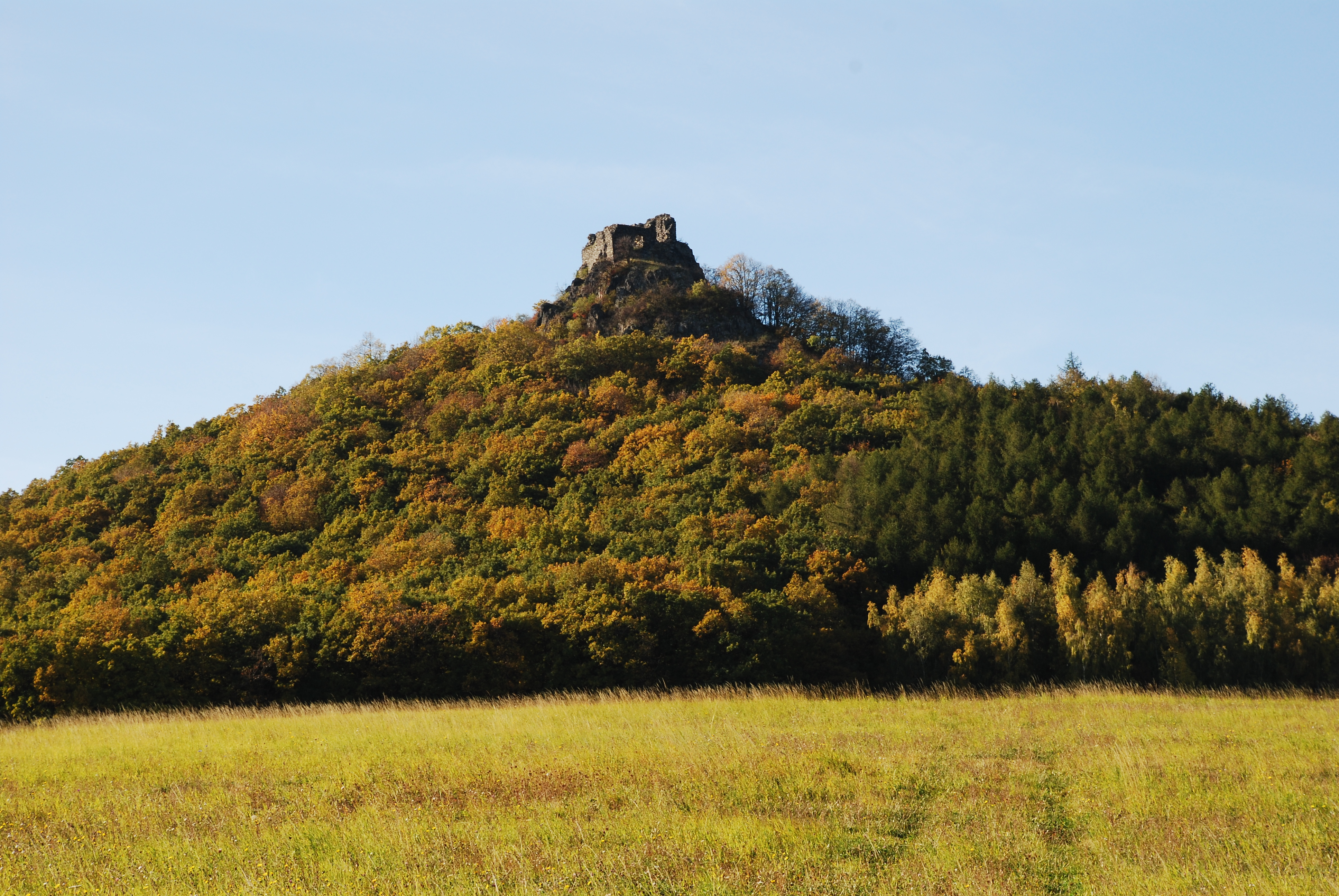 Oltářík (Hrádek)